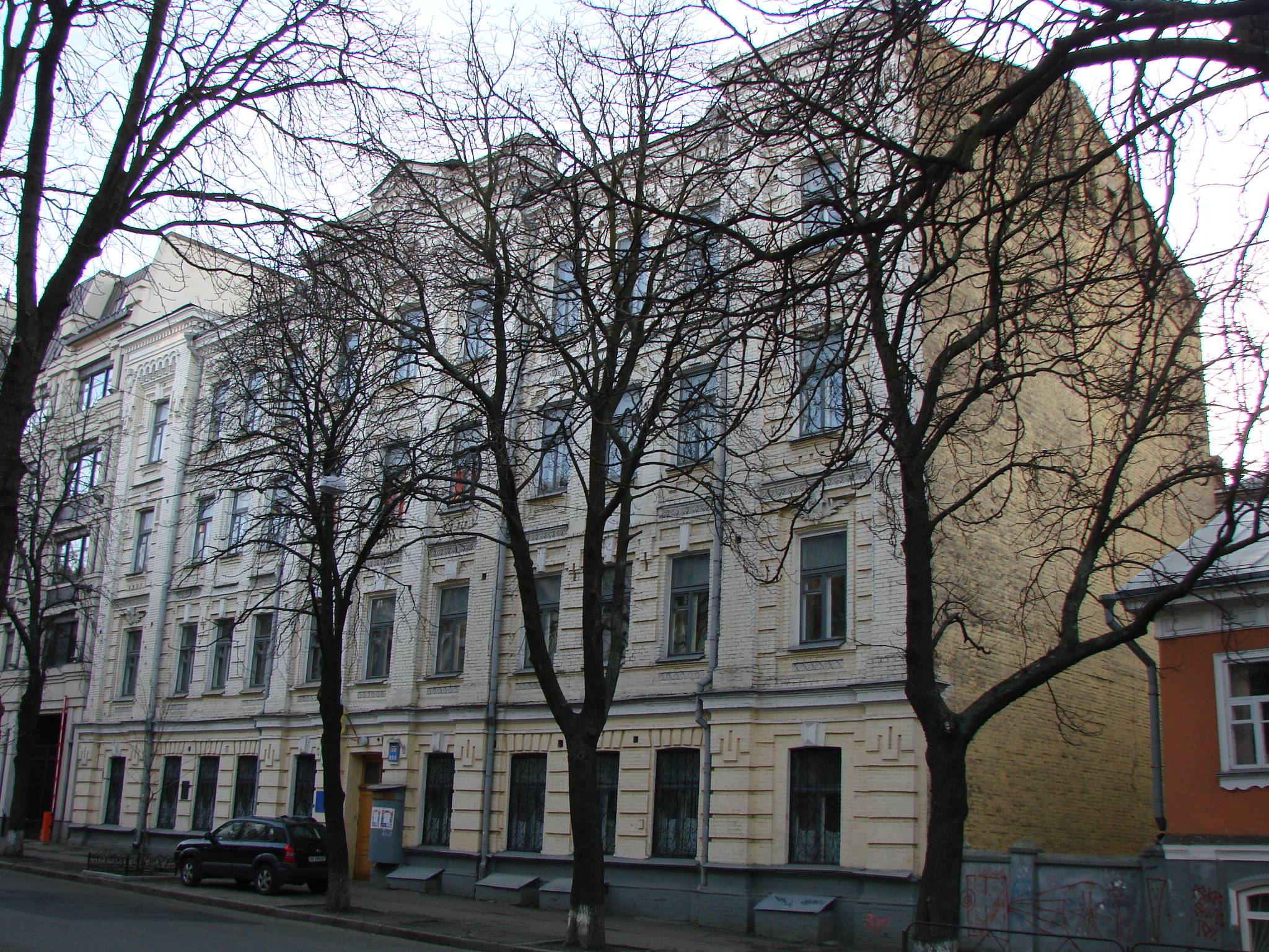 Ярославів Вал, 25, Київ